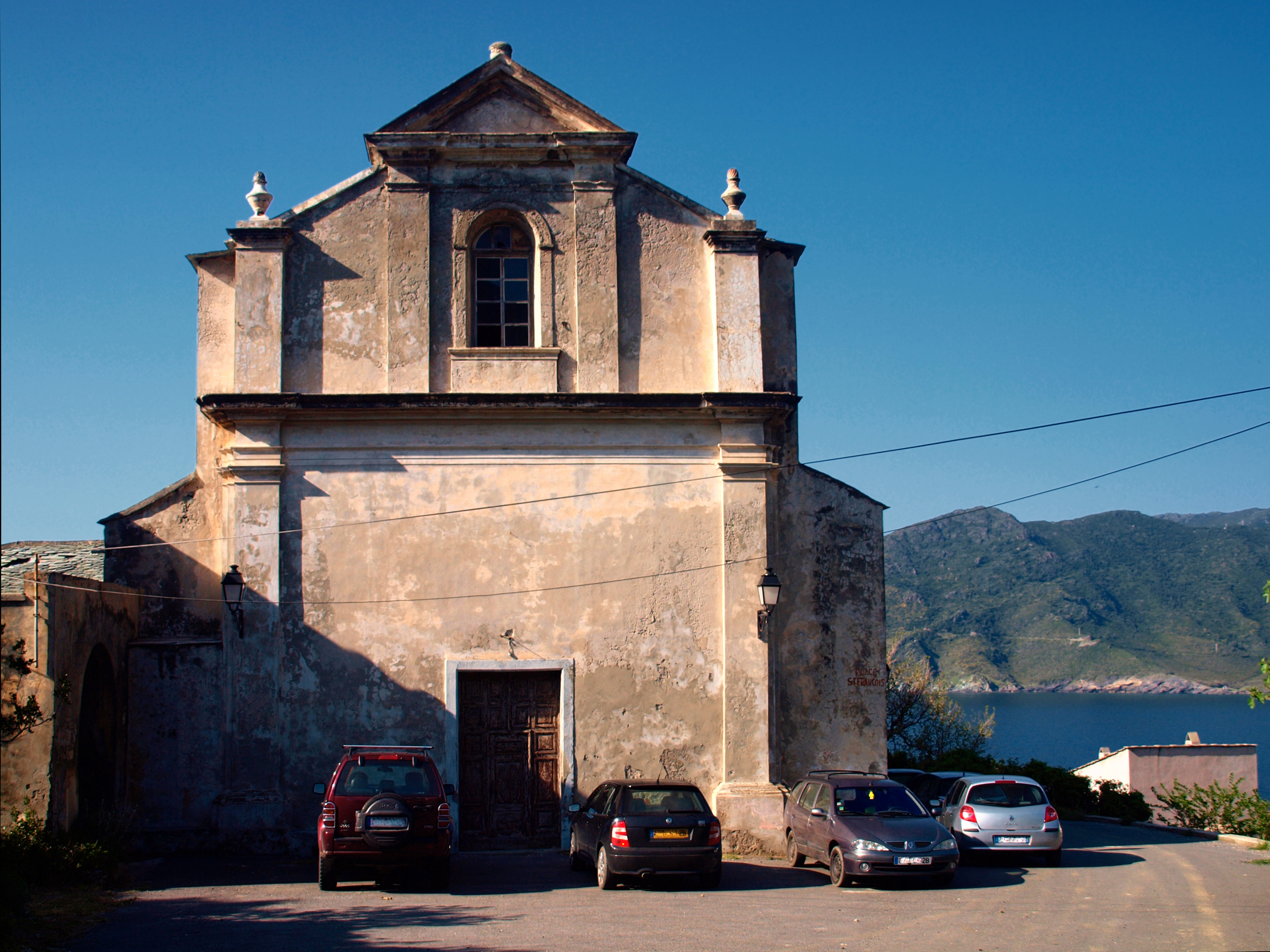 Pino (Haute-Corse) - Façade principale de la chapelle de l'ancien couvent San Francescu.